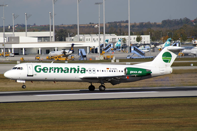 Germania Fokker 100 D-AGPL